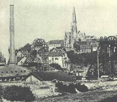 Grube Maybach (Friedrichstal) mit Bildstock